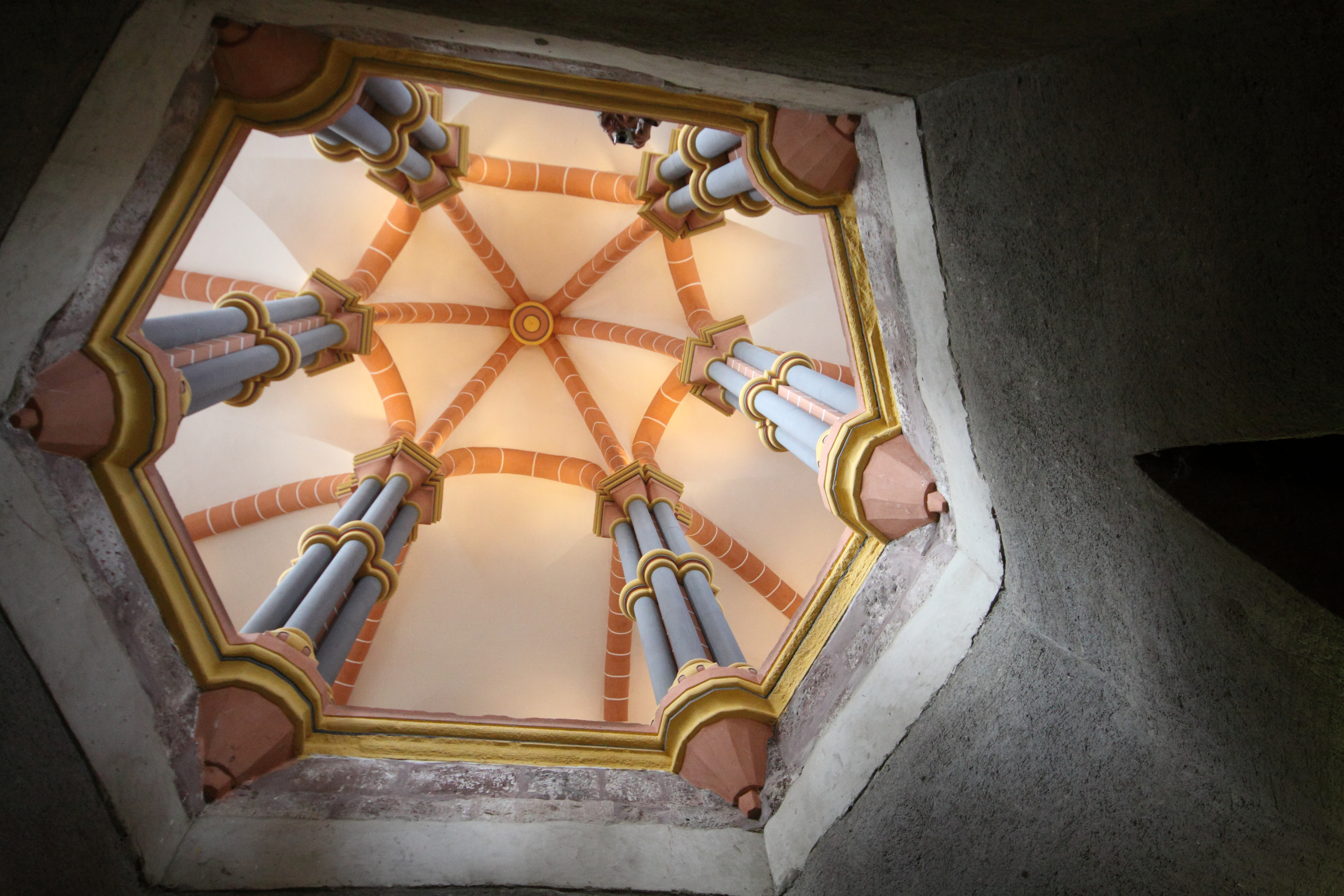 Obergeschoss.